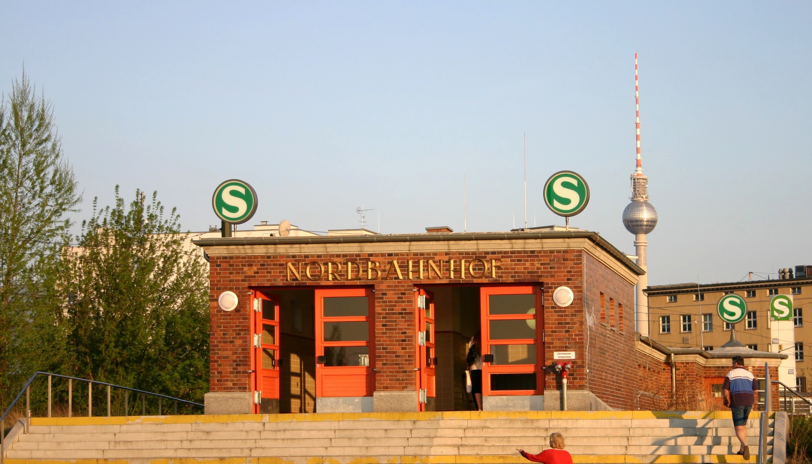 Nördlicher Zugang zur Berliner S-Bahnstation Nordbahnhof